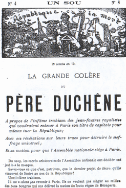 Première page du "Père Duchêne" de Wermersch, Vuillaume et Humbert.